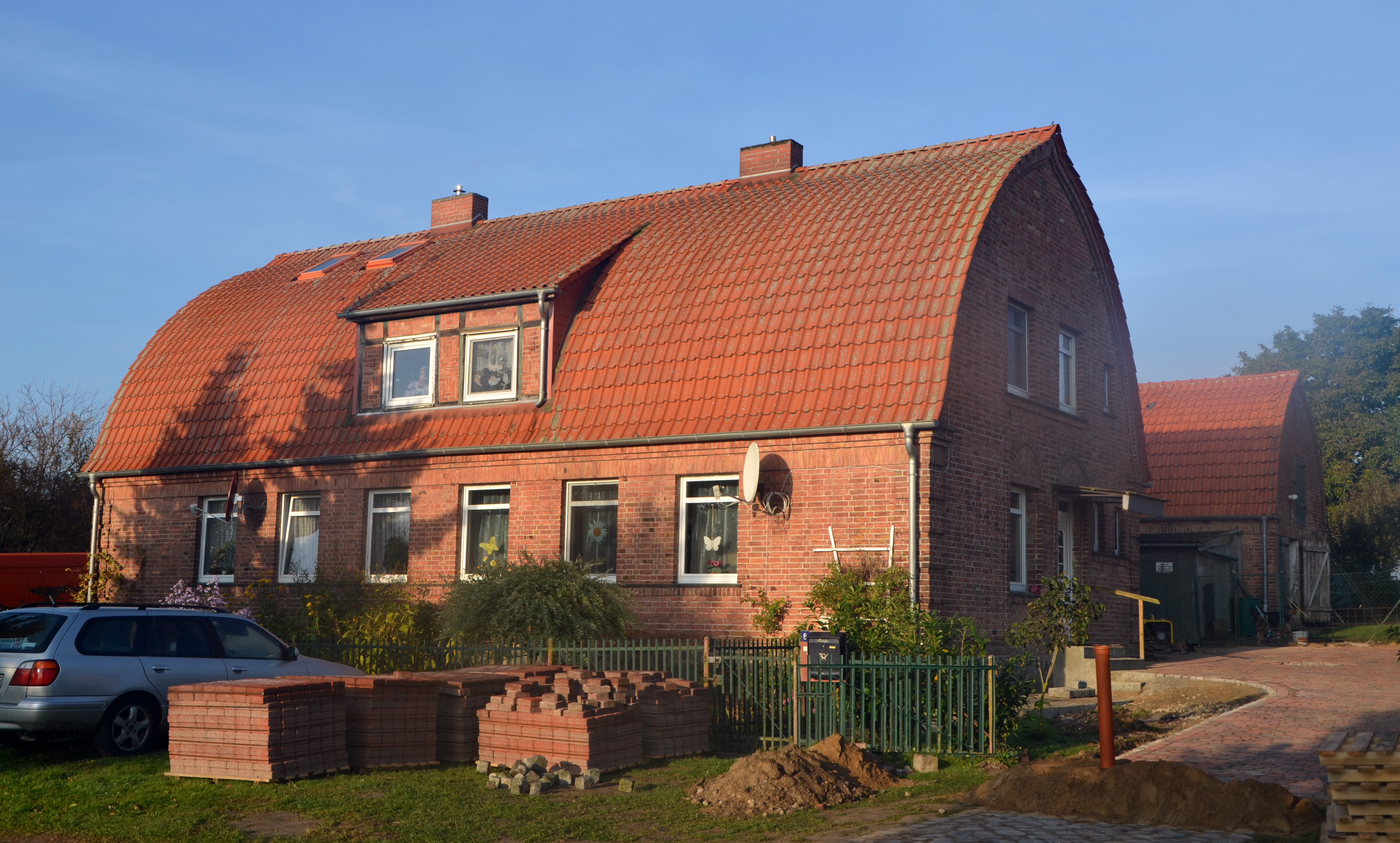 Benitz Dorfstr7/8 - Baudenkmal